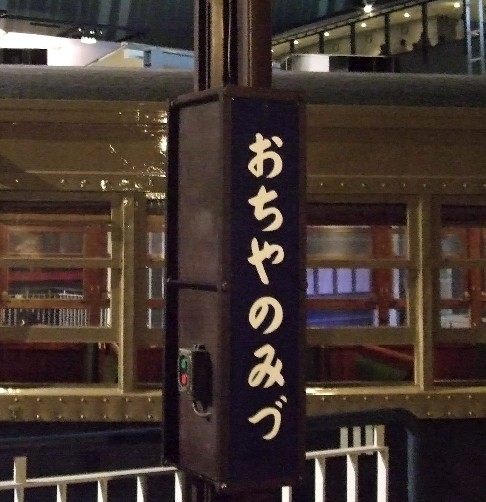 御茶ノ水駅の旧駅名標。鉄道博物館にて。